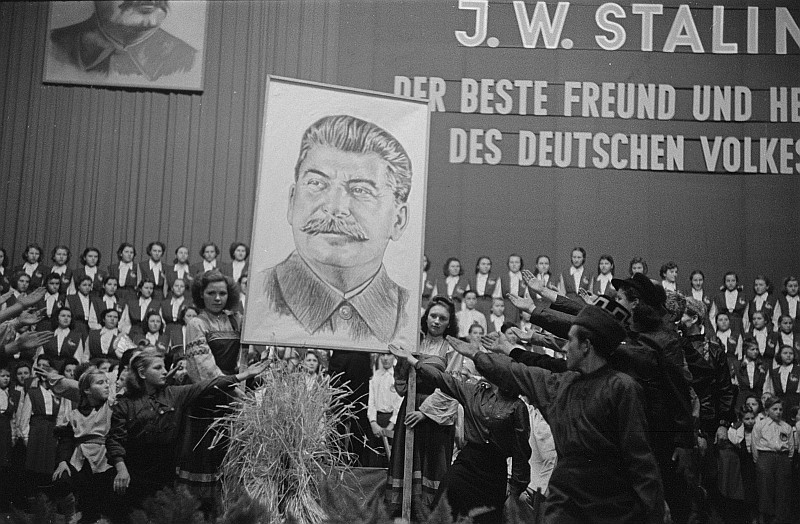 Original image description from the Deutsche Fotothek Chöre mit einem Porträtbild Stalins auf der Bühne